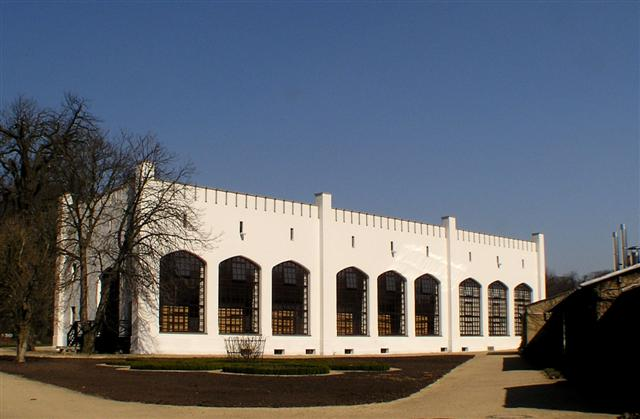 Die Orangerie in Bad Muskau